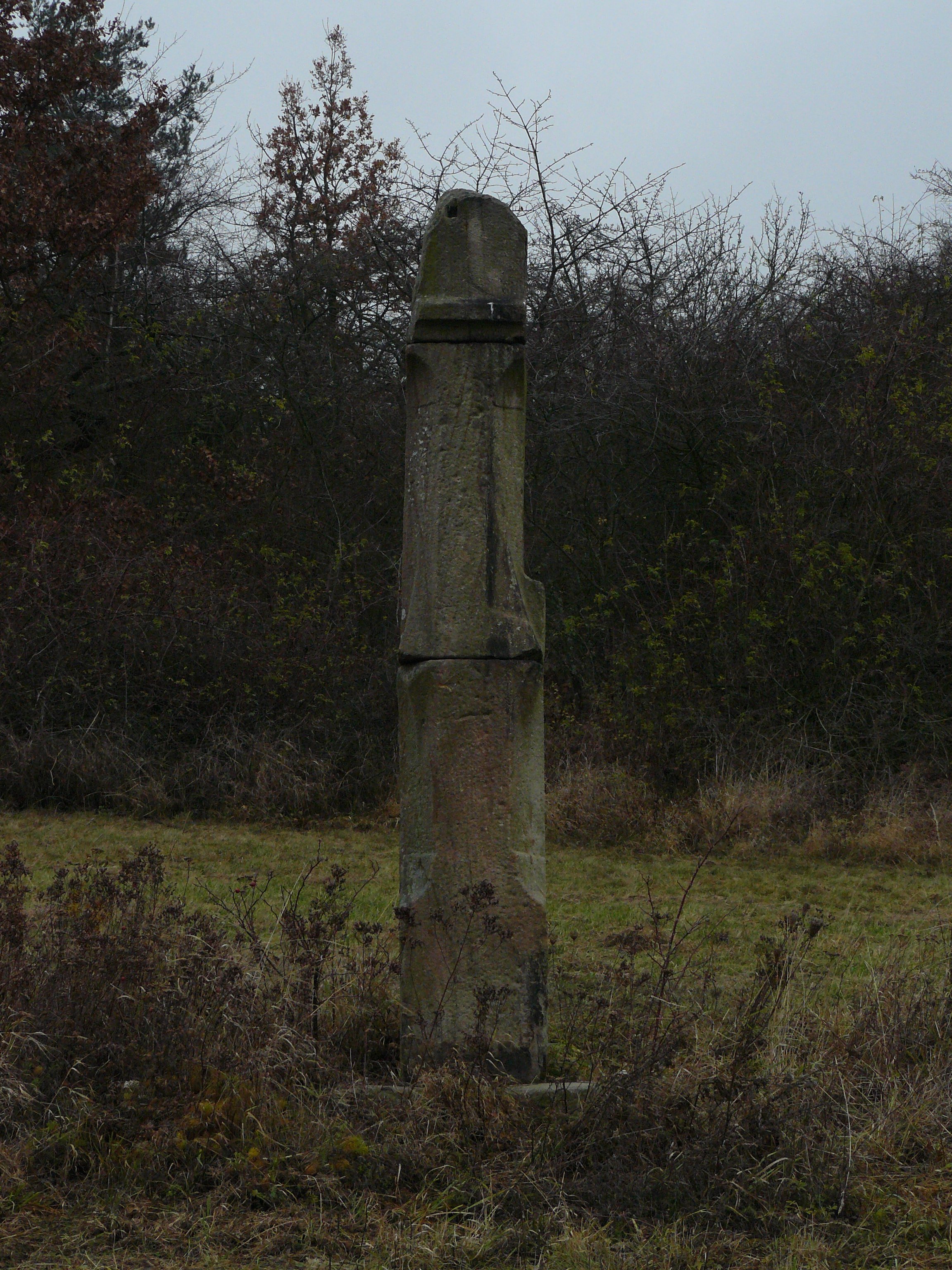 Cerhovice - torzo gotických božích muk při cestě k PP Studánky u Cerhovic